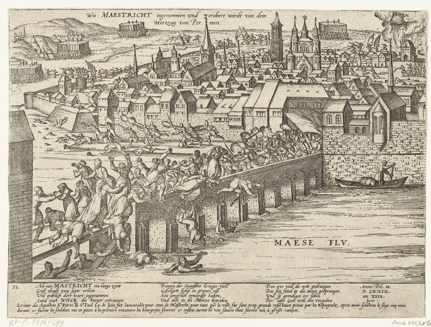 Siege of Maastricht (1579)